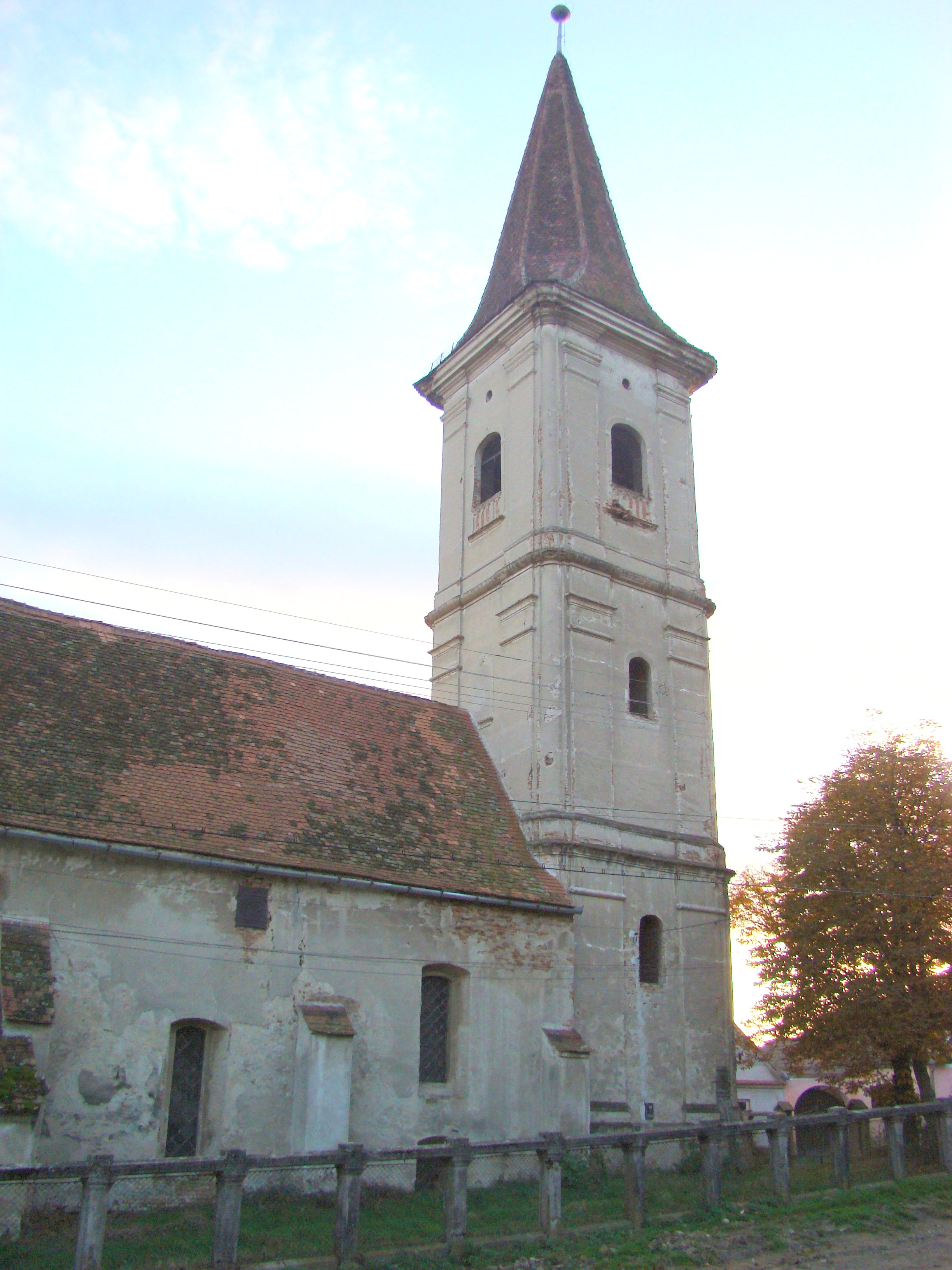 Biserica evanghelică Șeica Mare, Sibiu